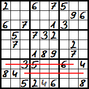 Sudoku